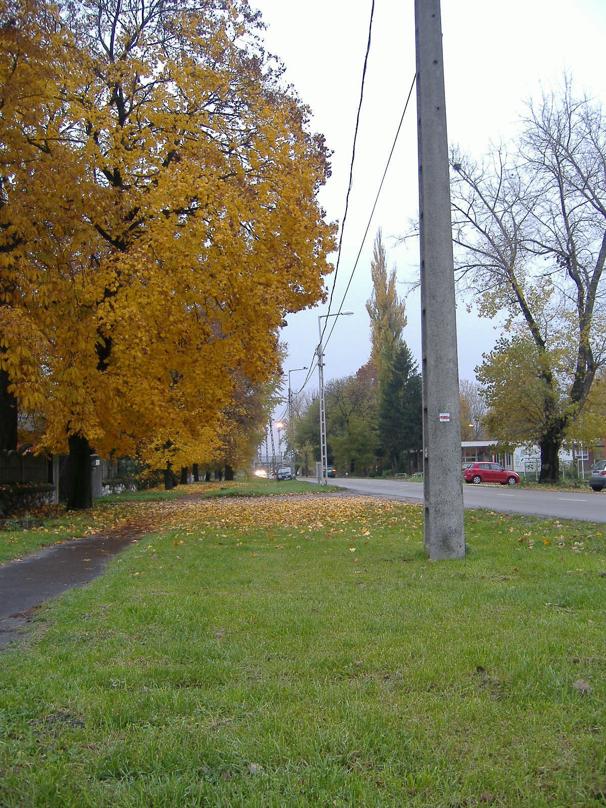 A Dombóvári GV nyomvonala az állomás és a műhely közt